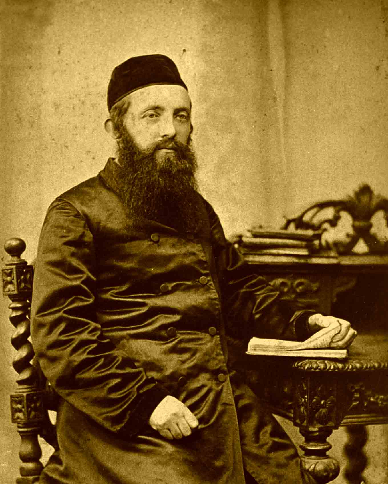 רבה של העיר טשענסחובה בדרום מערב פולין